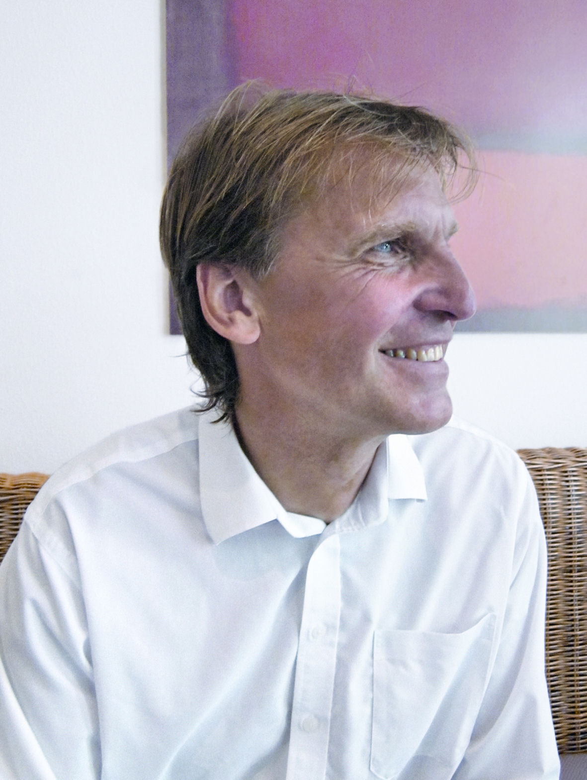 Portrait Engelbert Thaler